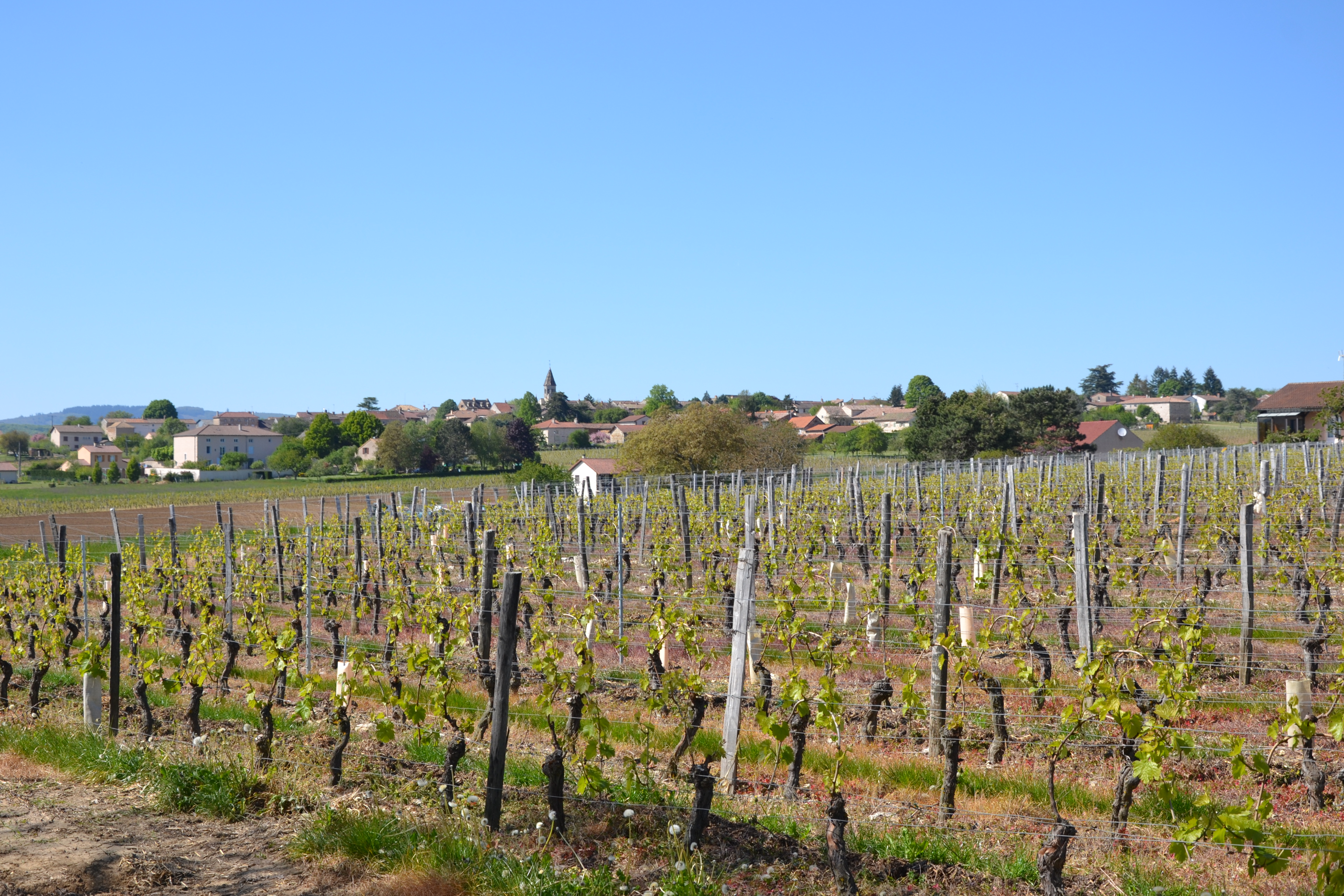 Vignoble de l'AOC Viré-clessé, à Clessé (71)